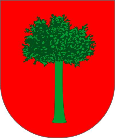 Orendain herriko armarria